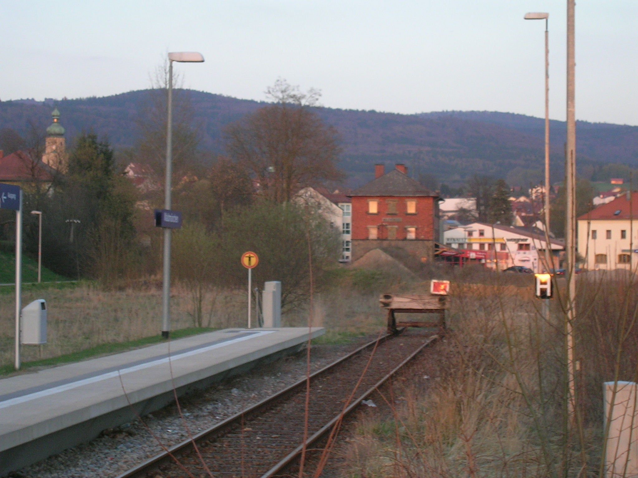 neuer Haltepunkt und alter Bahnhof in Waldmünchen, April 2009